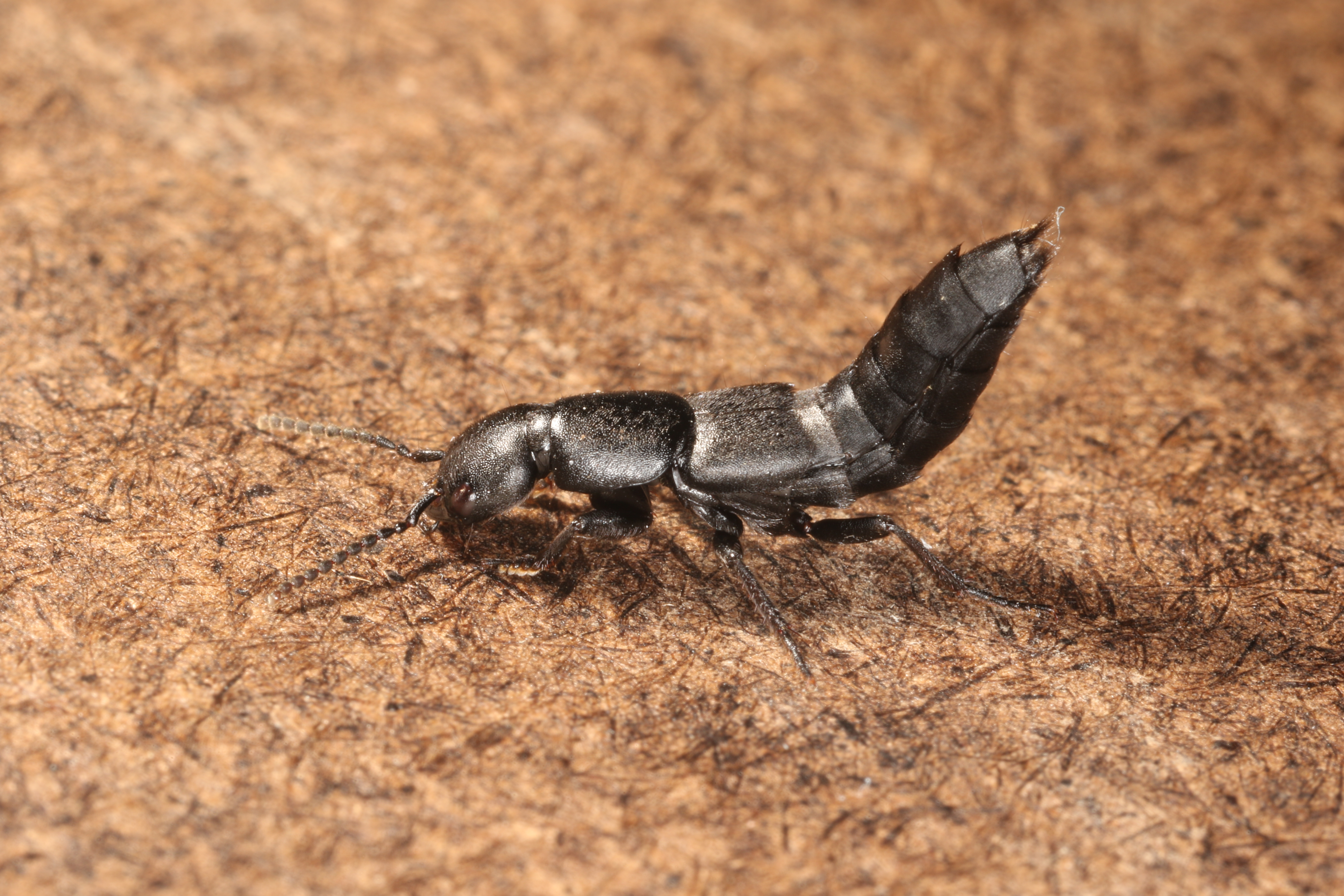 Ocypus nitens (Schrank, 1781), found under rock, Søborg, Denmark, 9 April 2016